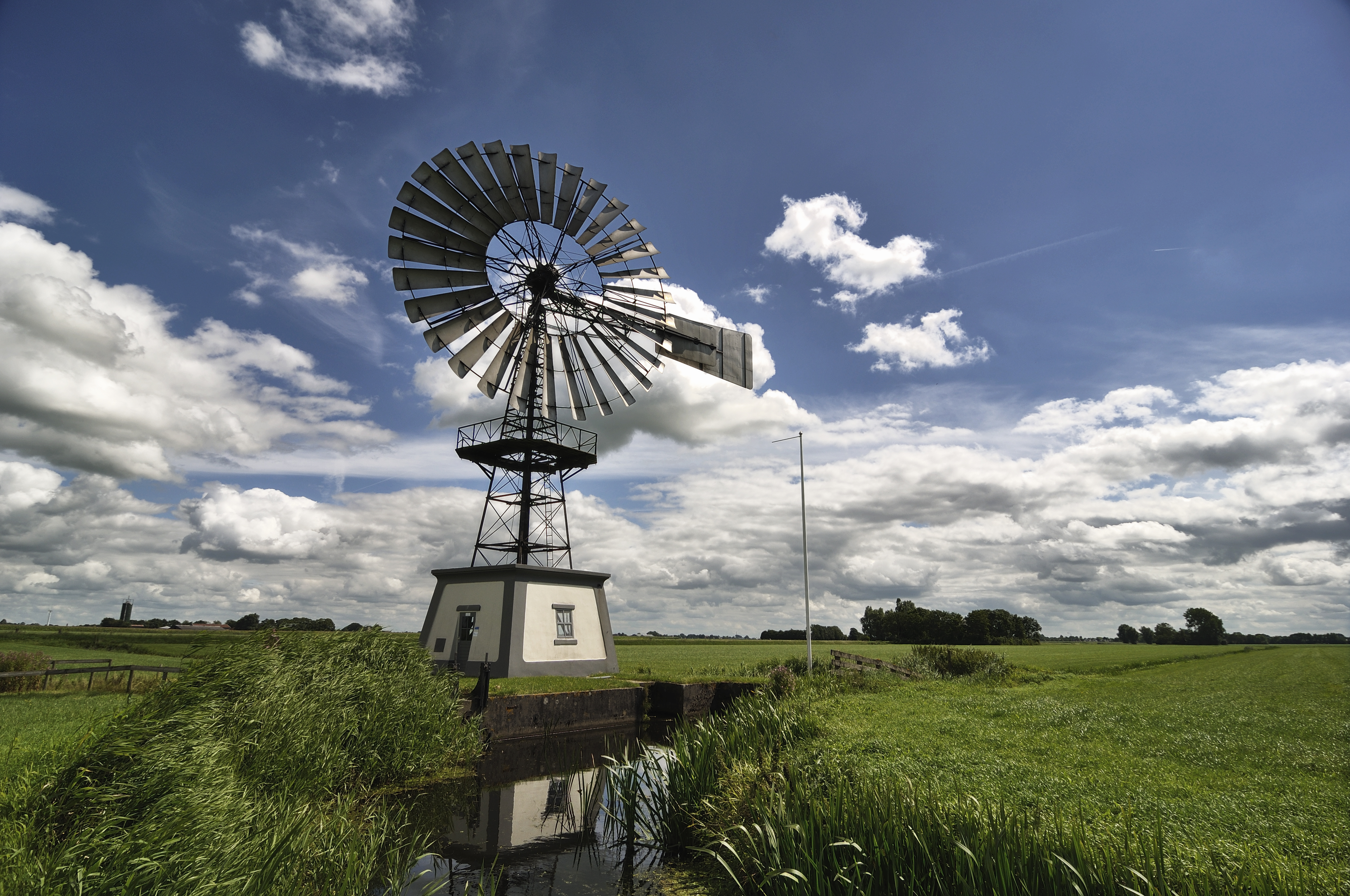 Dagje in friesland, deze Amerikaanse windmotor op de foto gezet.